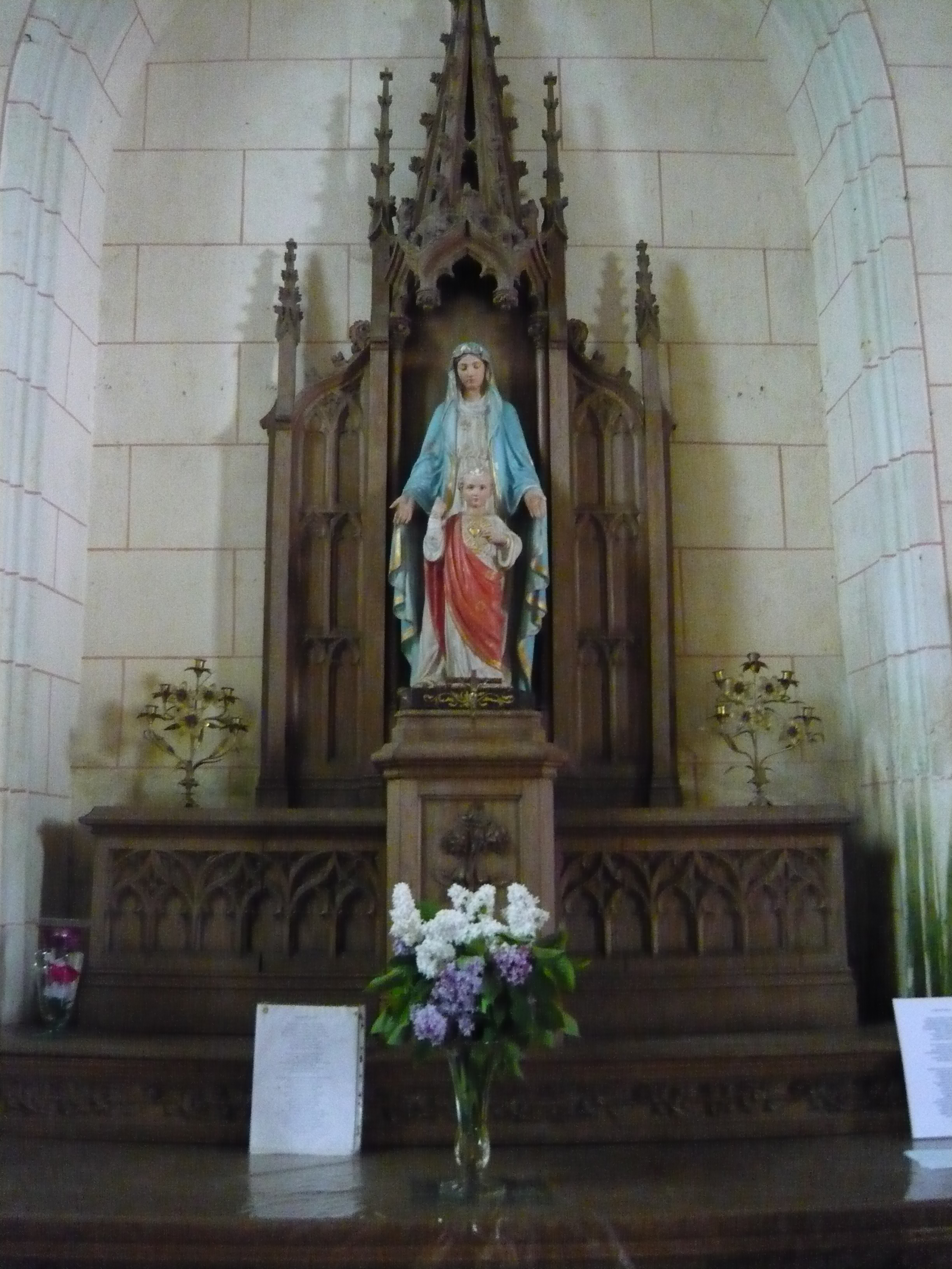 intérieur Chapelle Ste Emerance